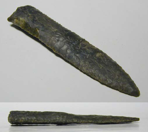 Ett exemplar av flintdolk från senneolitikum, fyndort i södra Sverige. Dolken kommer från Hovmansgården i Flittorps by, Tiarps socken, Falköpings kommun, f.d. Skaraborgs län, Västergötland, Västra Götalands län, Sverige. Dolken skänktes år 1933 till Falbygdens museum i Falköping och har där inventarienummer 1023:1 (2M16-F1023-01).